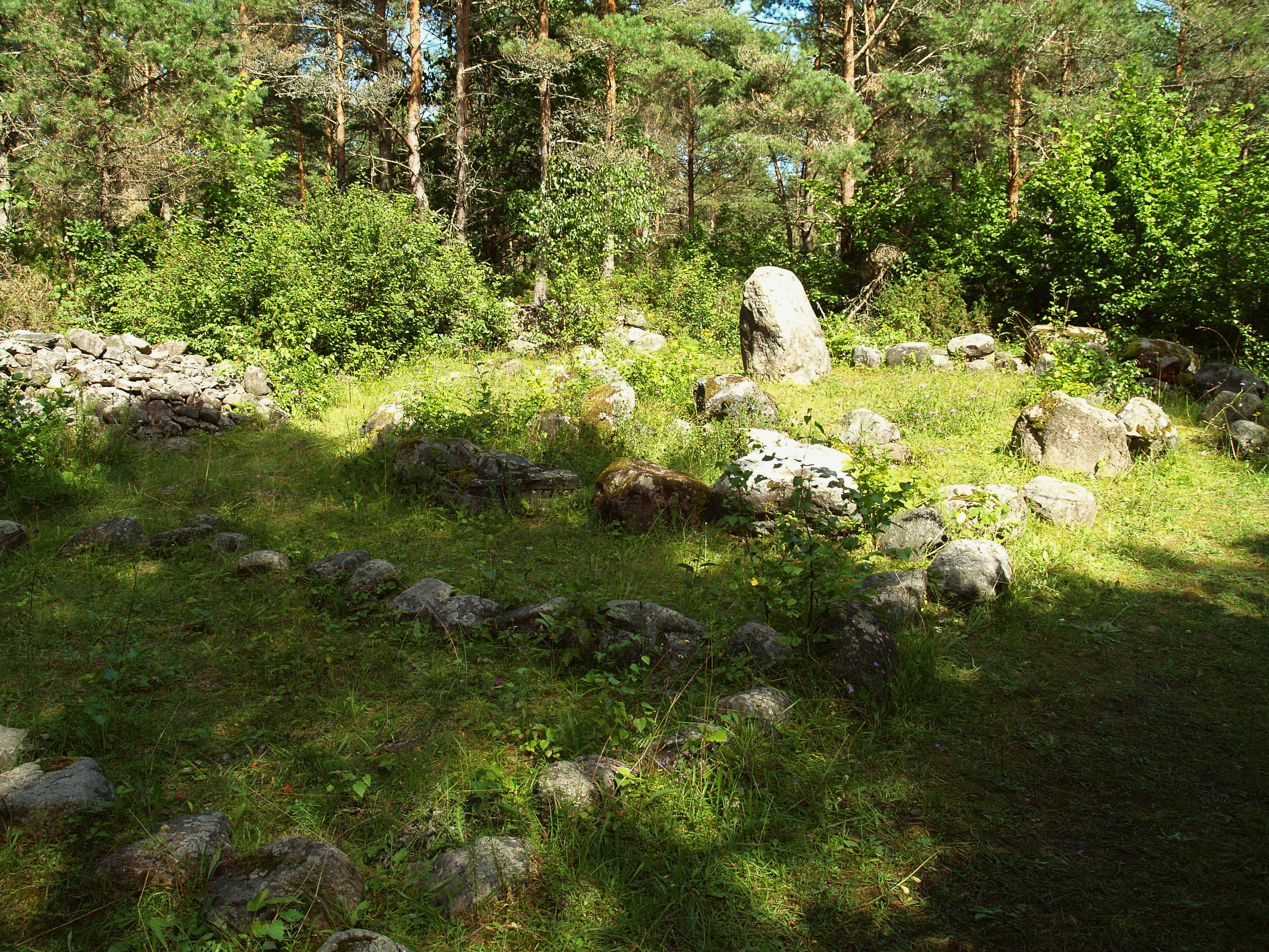 Mäla kalmed ehk Ussimätta kalmed